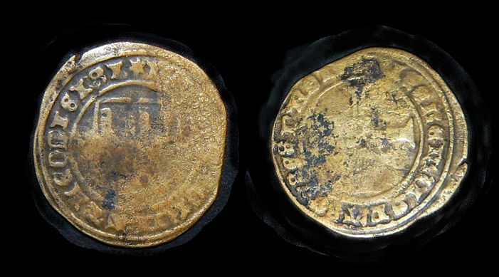 Monnaie liégeoise en cuivre de Jean de Hornes. Le monnayage en cuivre est très rare dans la principauté.